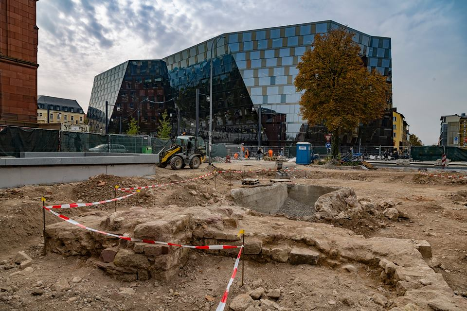 Im Vordergrund Fundamentmauer der Synagoge, dahinter Betonfundament eines Gebäudes der 1950er Jahre.